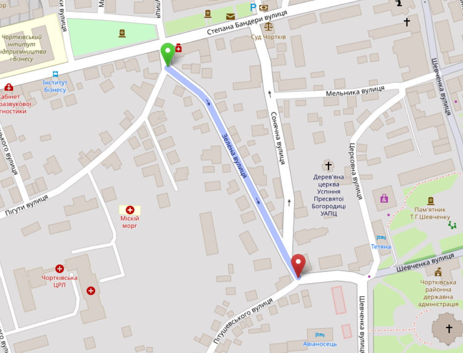 Вулиця Зелена у місті Чорткові Тернопільської області.